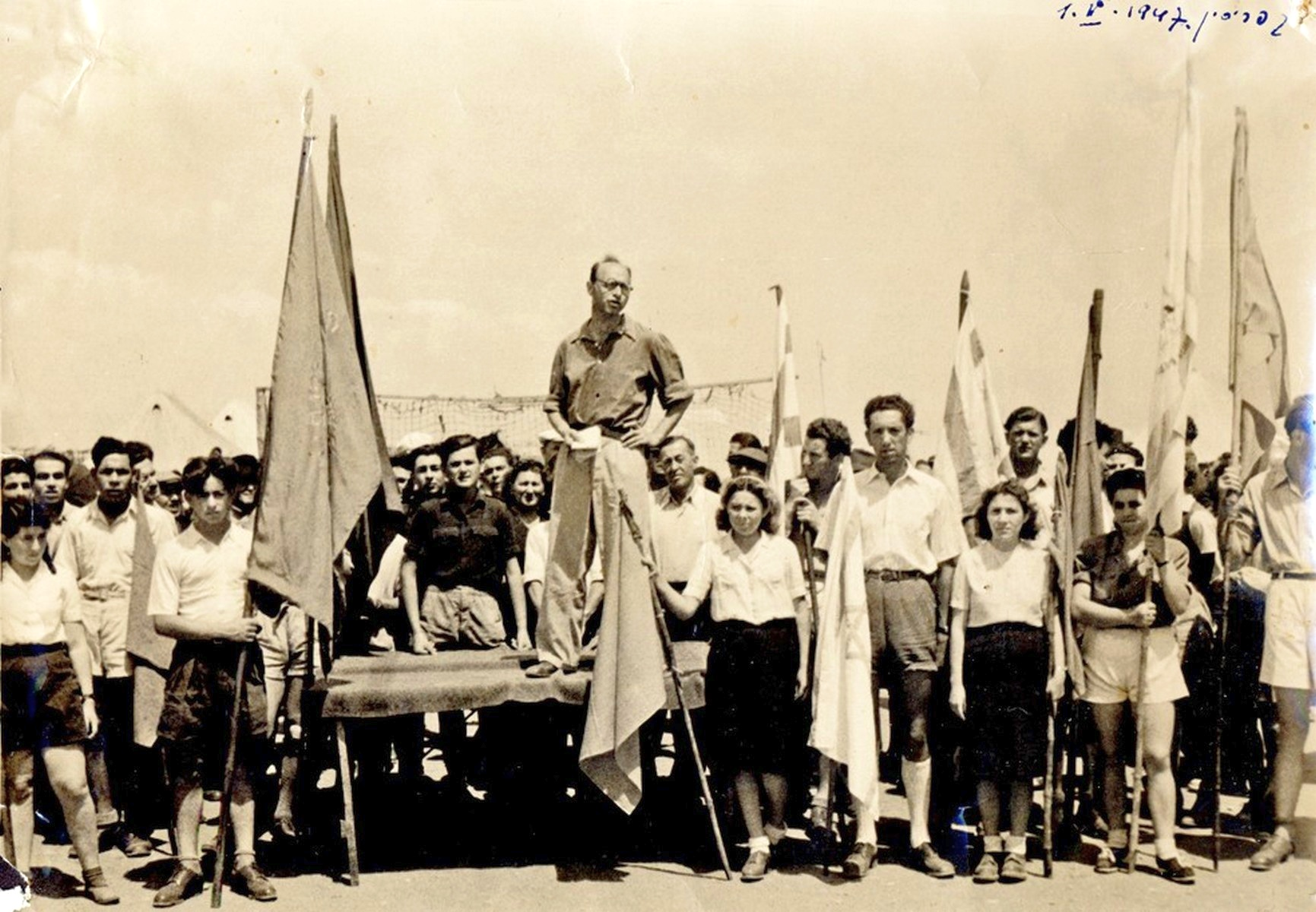 מנחם אורן נואם במחנה המגורשים בקפריסין, אחד במאי 1947